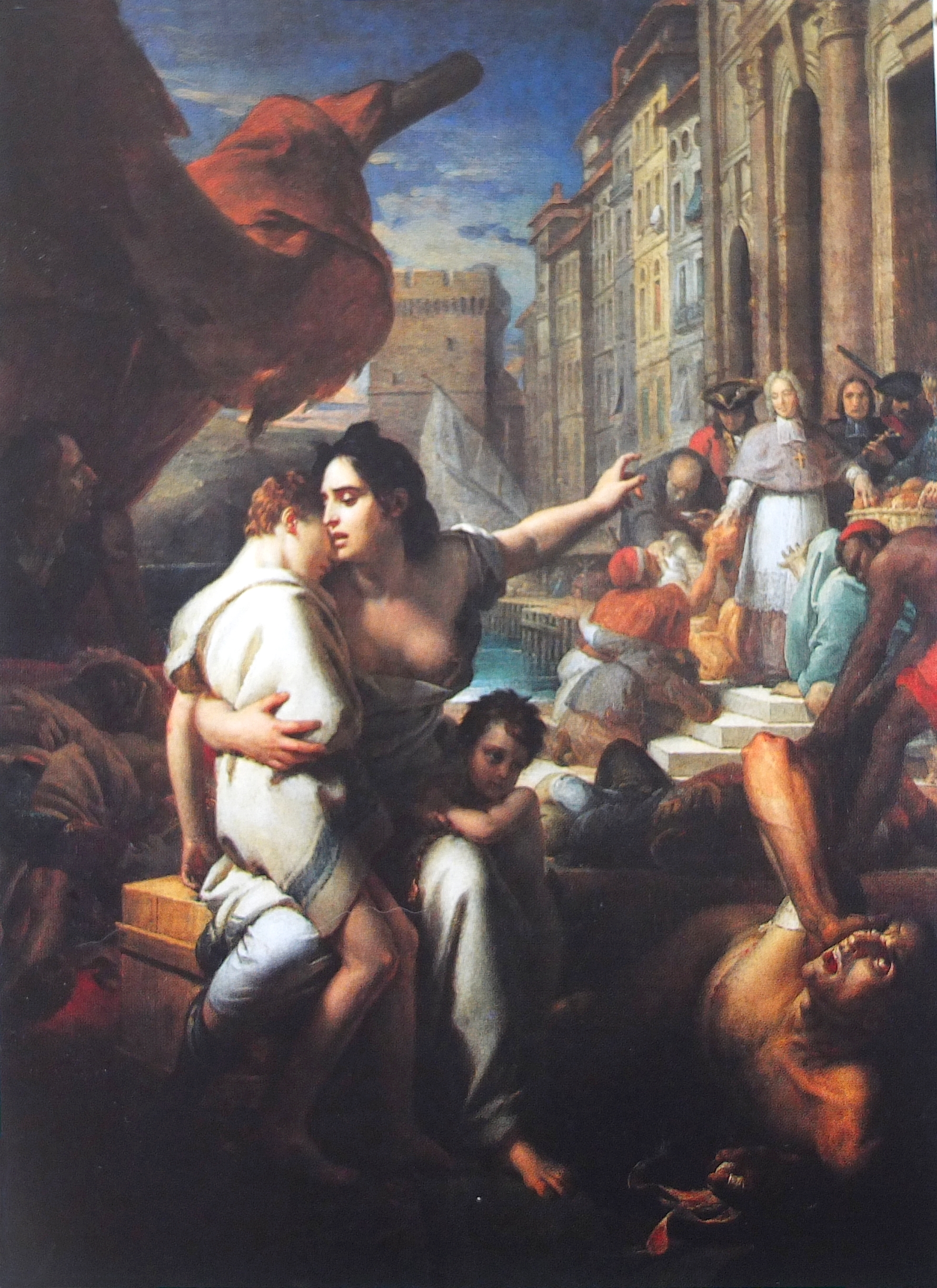 Monseigneur Belsunce pendant la peste de Marseille, huile sur toile par François Gérard, 1834. 258 x 191 cm. Musée des Beaux-Arts de Marseille.